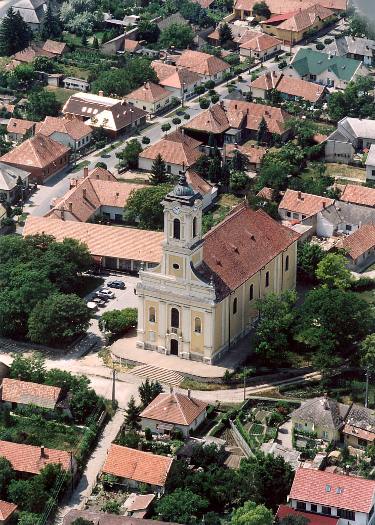 Nagyboldogasszony római katolikus templom, Ercsiben